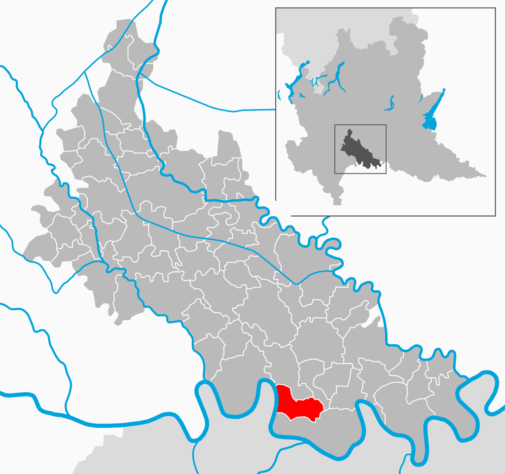 Il comune di Guardamiglio nella provincia di Lodi